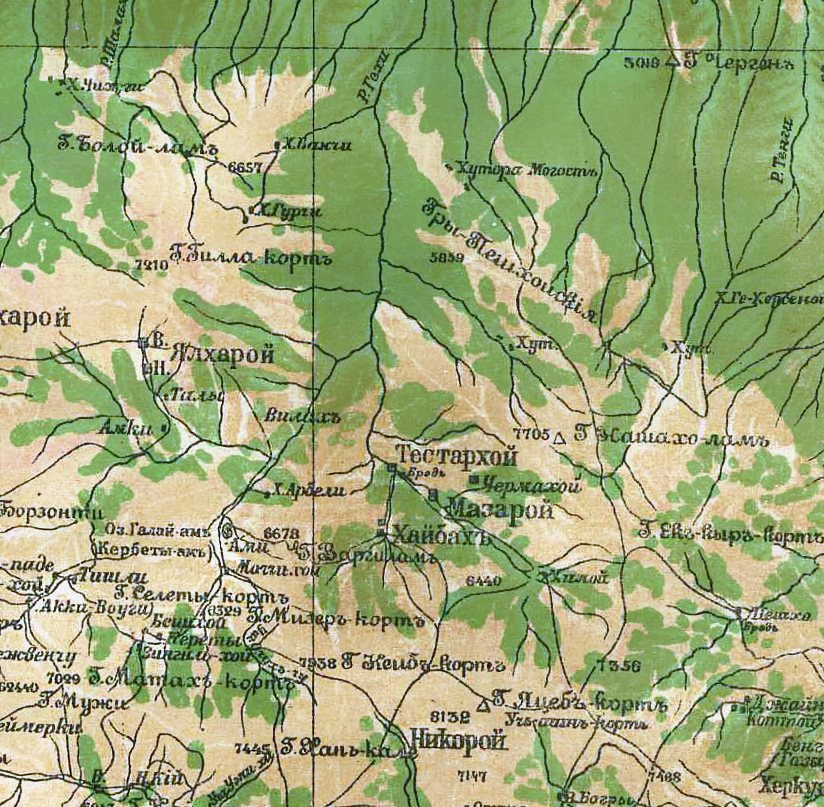 Аулы Нашхоя. Военно-топографическая пятивёрстная карта Кавказского края 1877 года